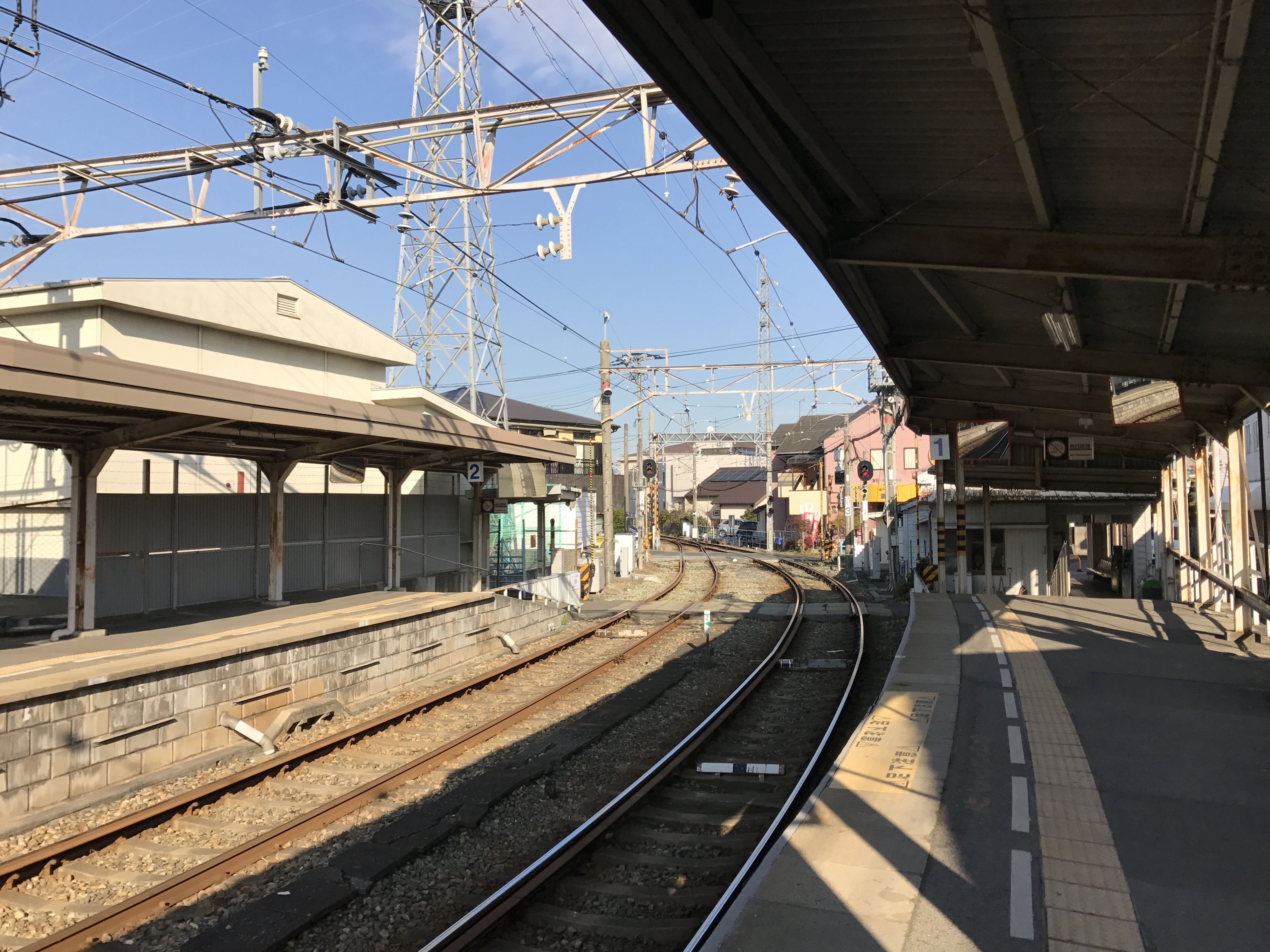 北野駅のホーム(奥は大城方面)